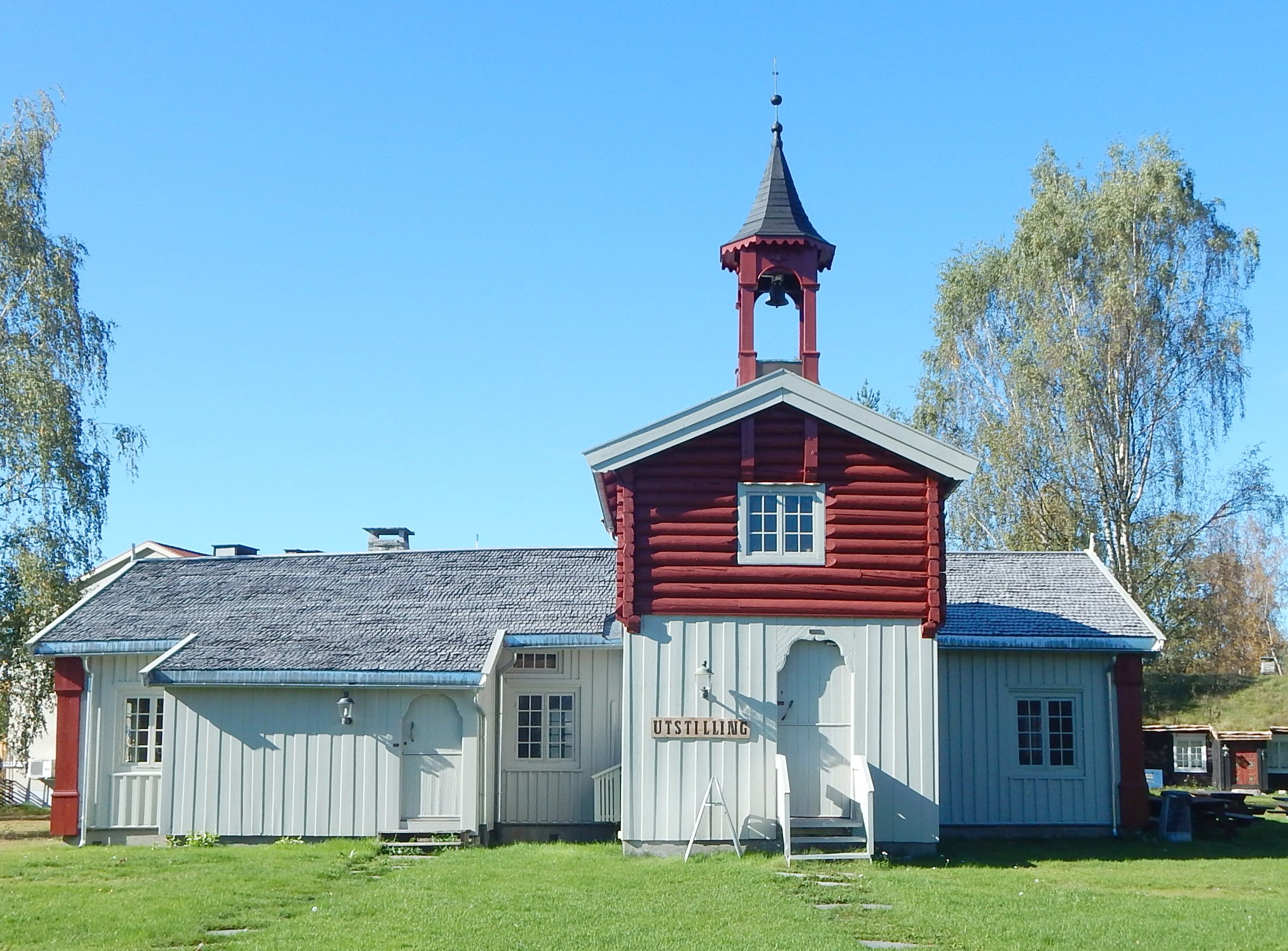 Barfrøstue fra Engen Trønnes, ved Stor-Elvdal Hotell (tidl. Koppangtunet) på Koppang. Fredet.